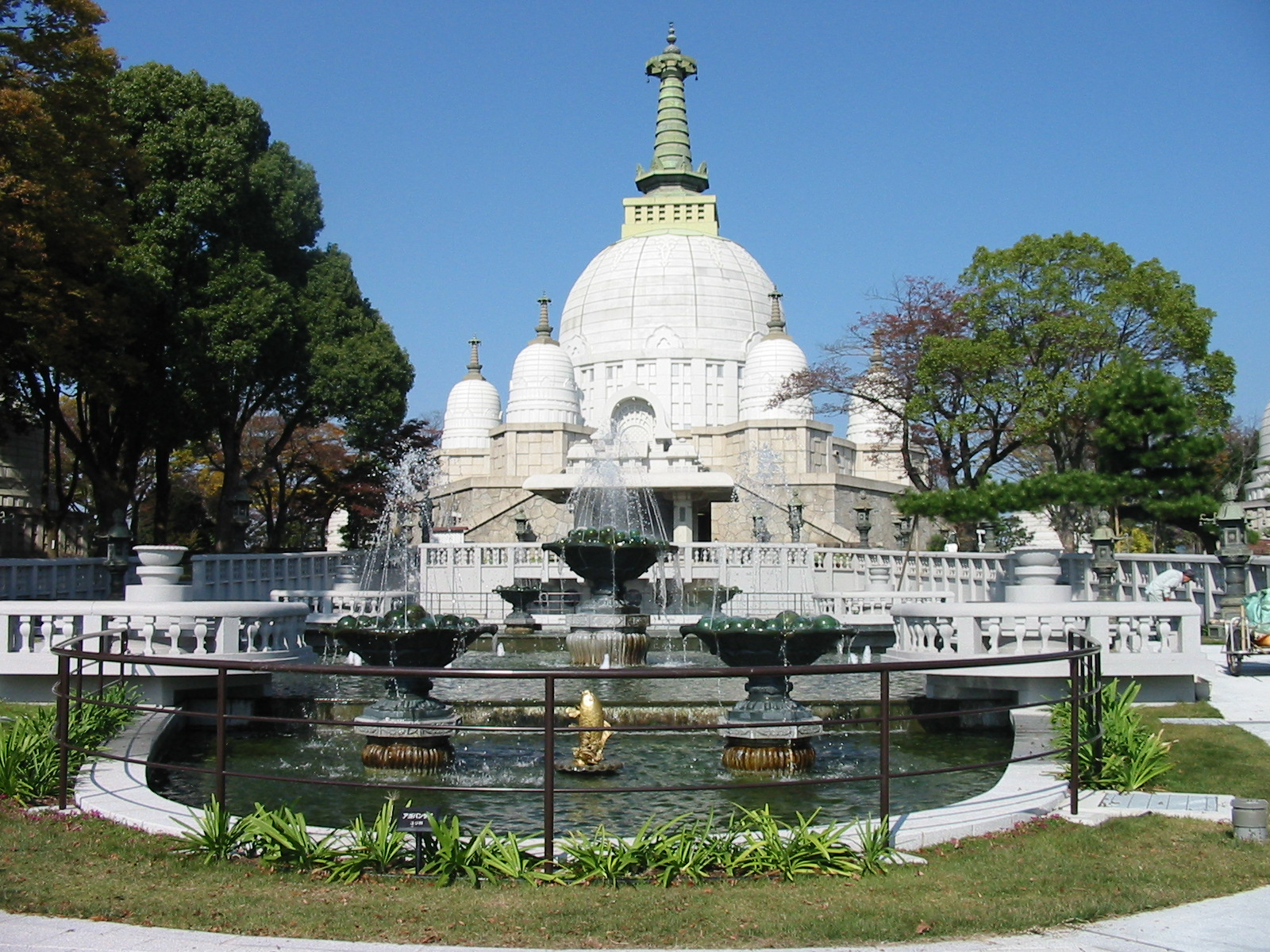 兵庫県姫路市名古山霊苑内にある仏舎利塔。昭和３５年に完成。